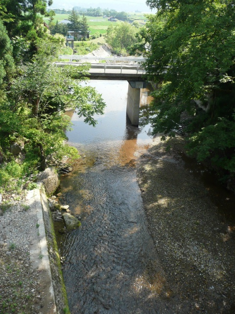 夜明島川